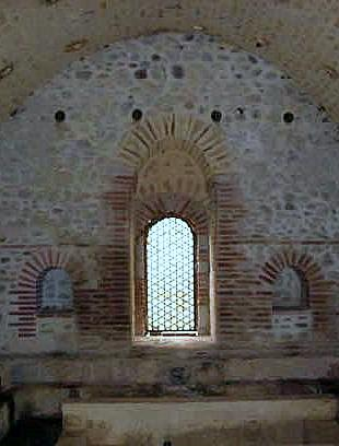 Le Terme Arabe di Cefalà Diana